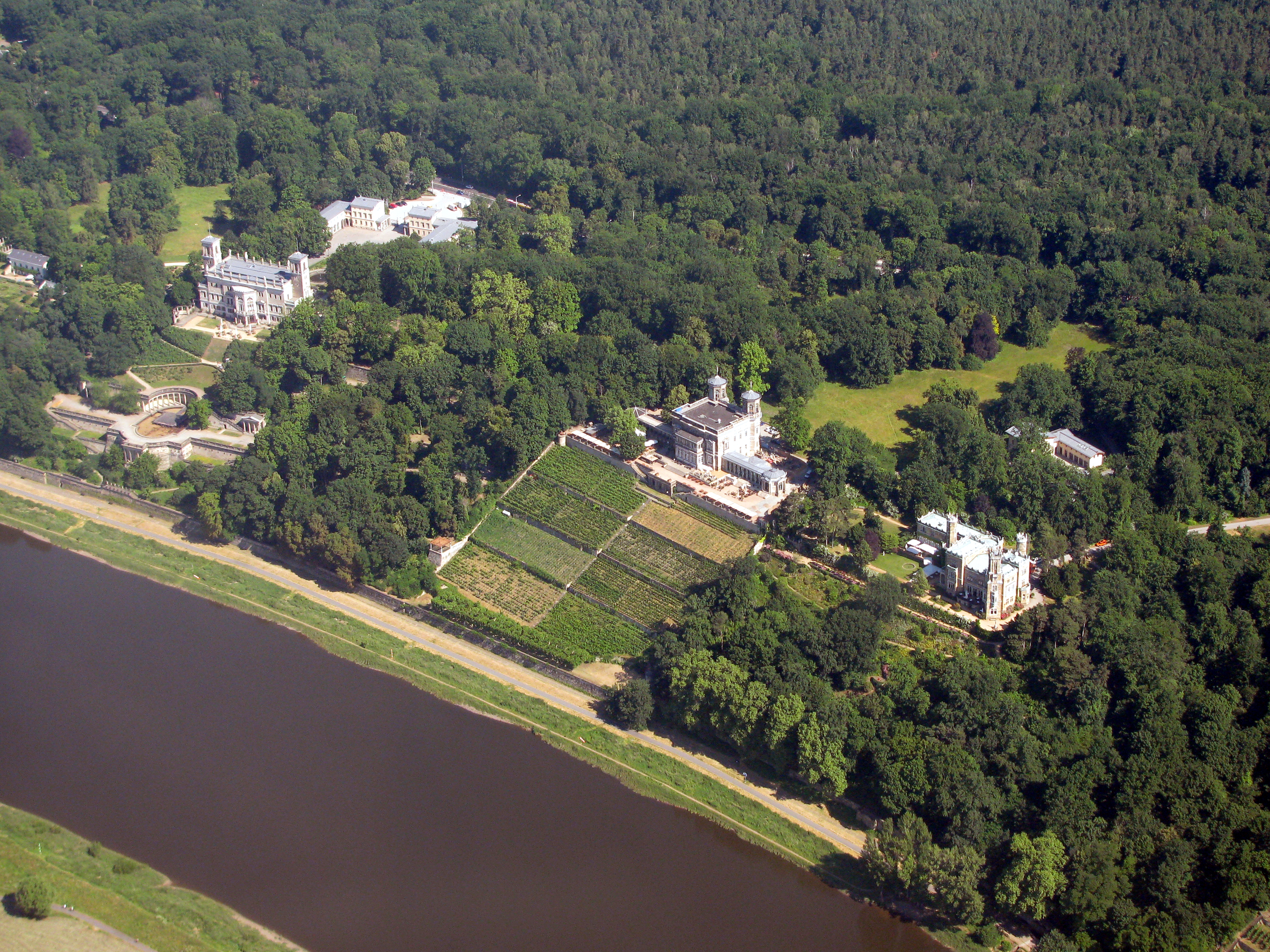 Luftbild Elbschlösser